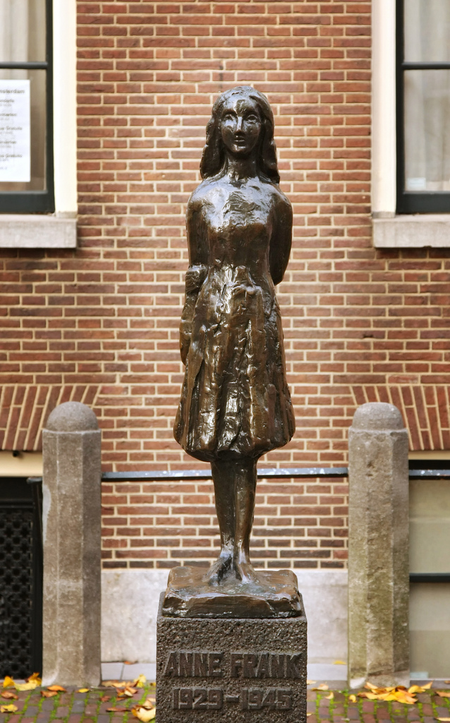 9 anne frank beeld